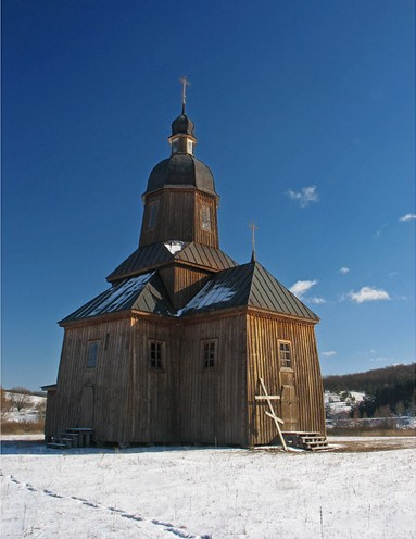 Миколаївська церква з Драбівців (перенесена до скансенку в с.Стецівка, Чигиринський район)